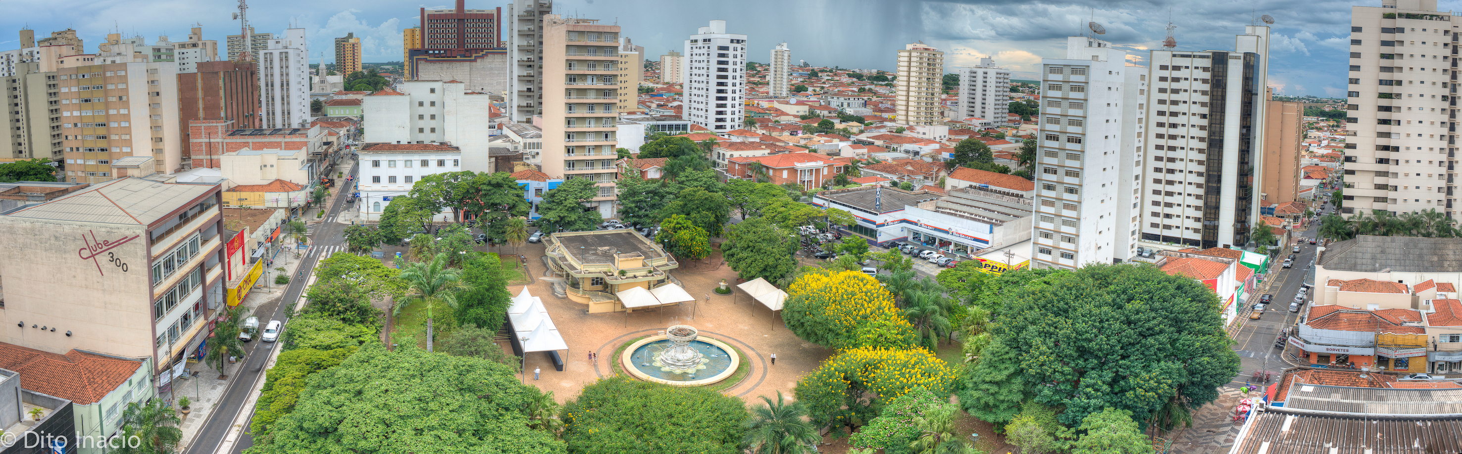 Panorâmica do Centro de Catanduva